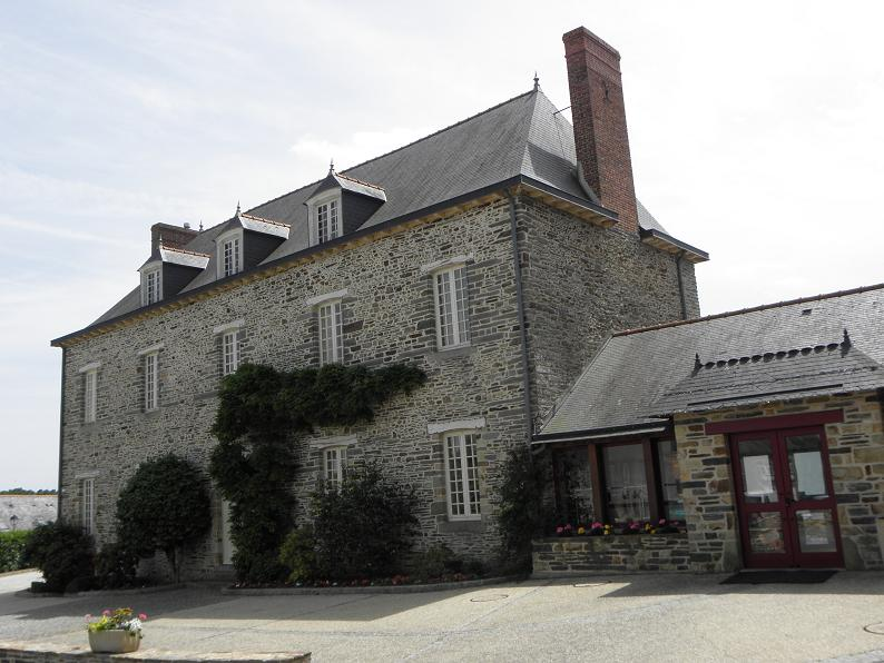 Mairie d'Amanlis (Ille-et-Vilaine, Bretagne, France).